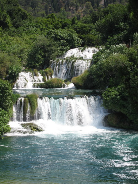 National park Krka